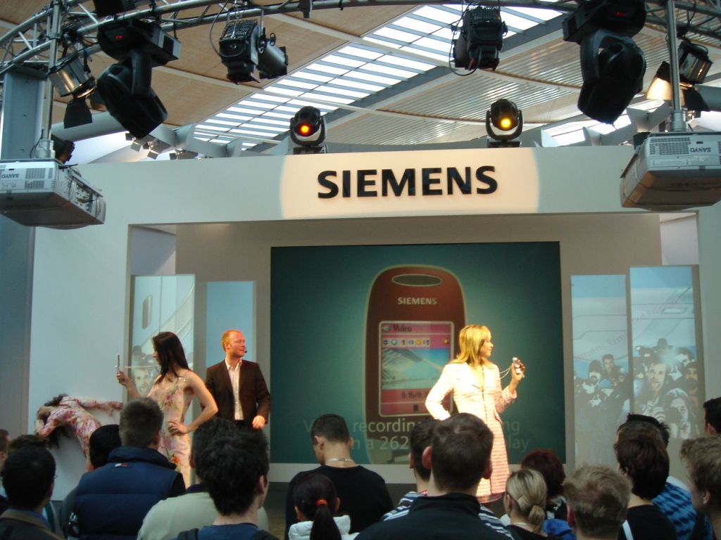 Siemens. Ort: Computer- und Telekommunikationsmesse Cebit 2005, Hannover